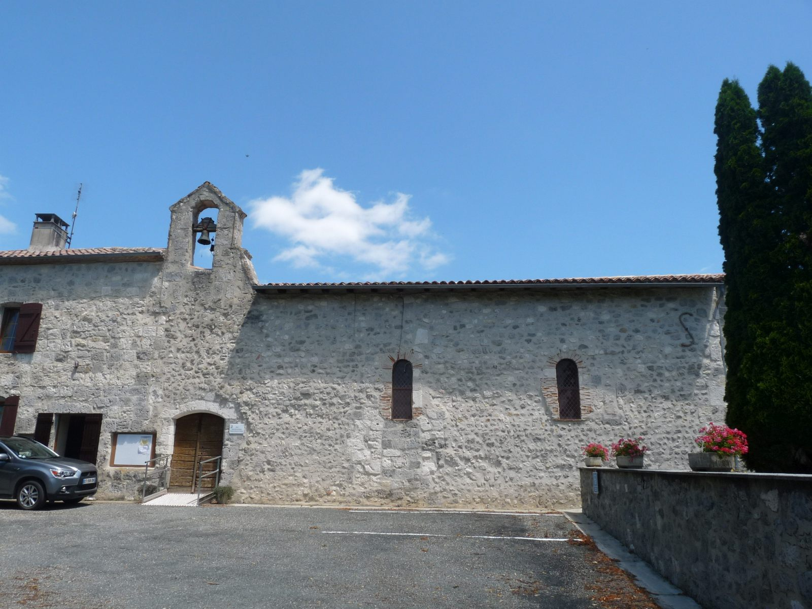 Eglise de Pompiey, Lot-et-Garonne, France